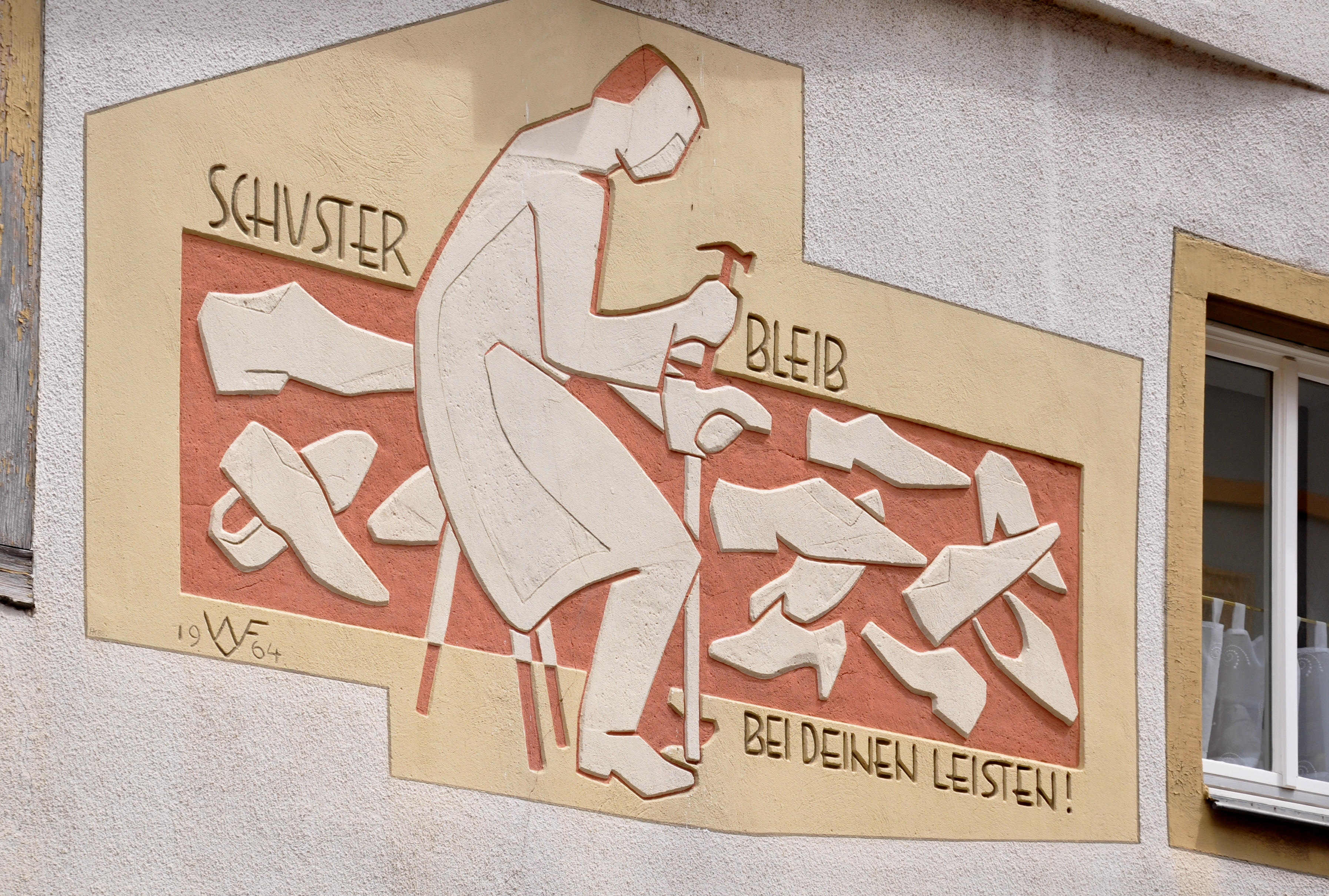 Ochsenfurt, Hauptstraße 60, Fassadenschmuck "Schuster bleib bei deinen Leisten" (Monogramm WF 1964)